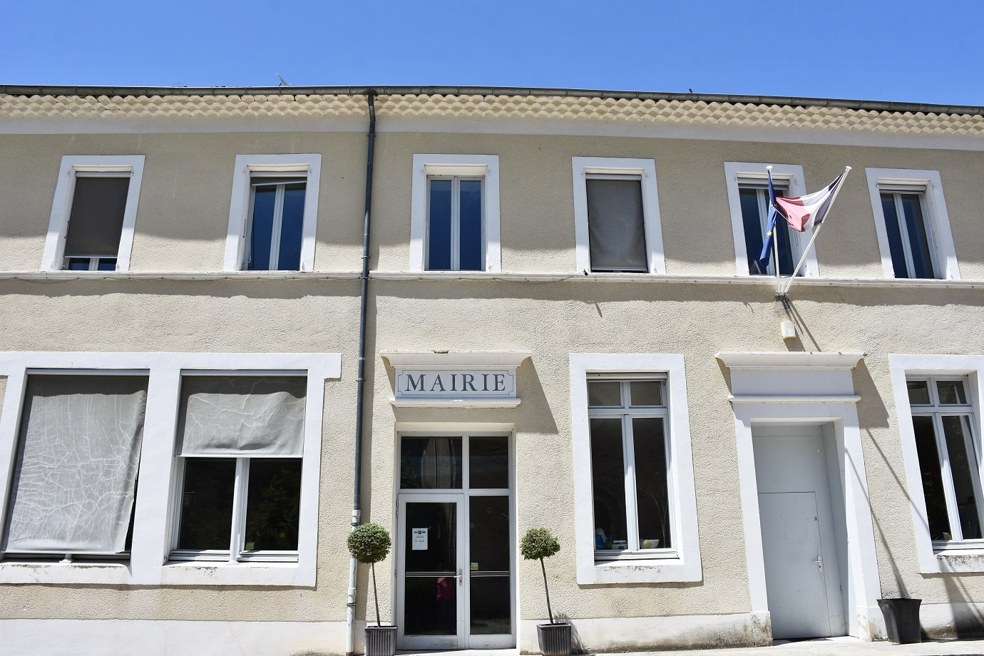 département de la Drôme